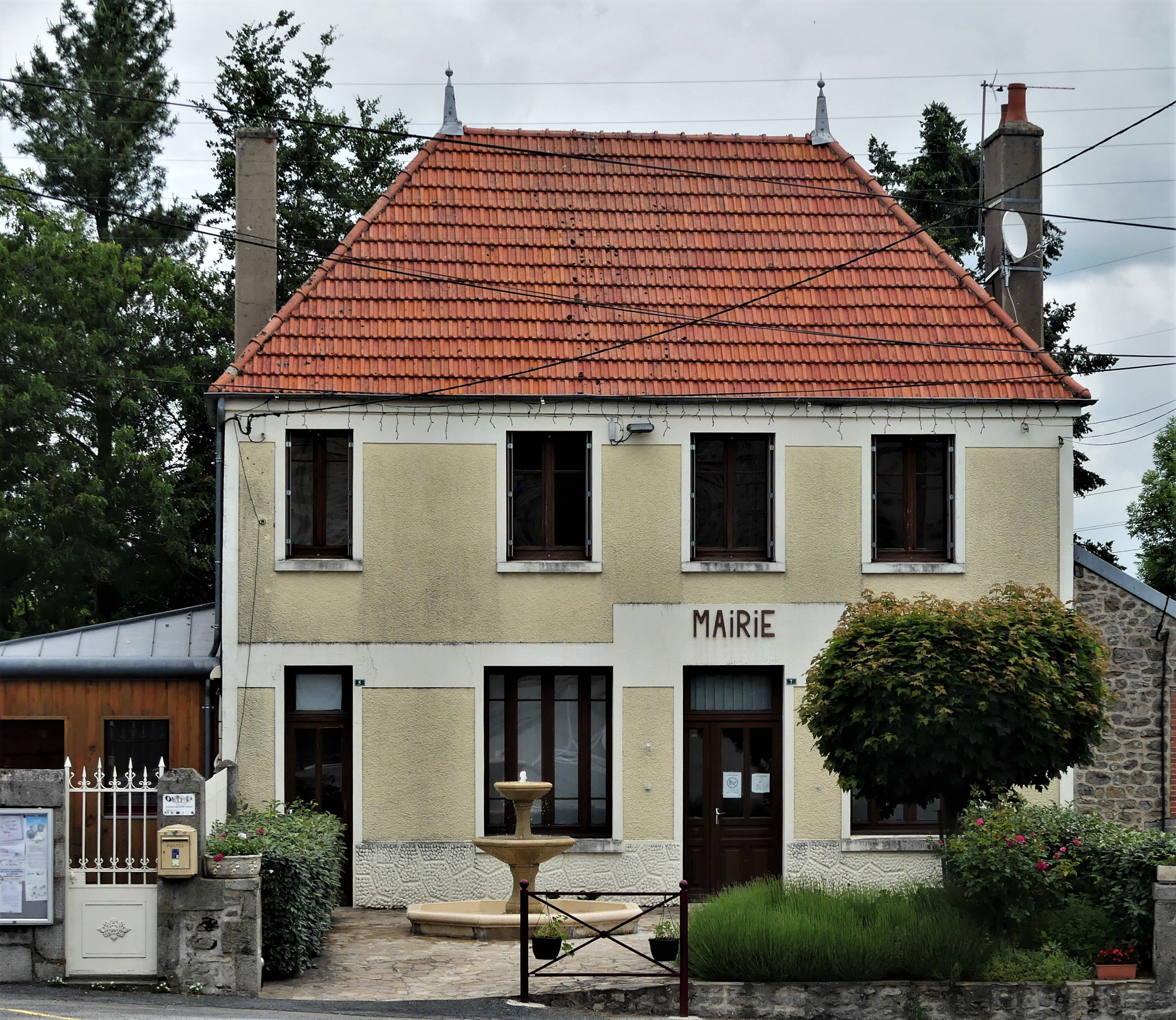 La mairie de Saint-Chabrais, Creuse, France.